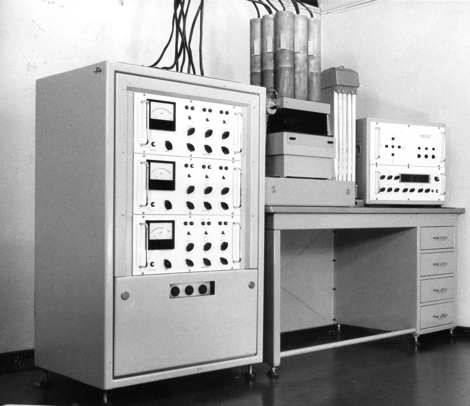 Prototyp des in der Arbeitsstelle für Molekularelektronik Dresden entwickelten vollautomatischen 9-fachen Fotorepeaters ANR